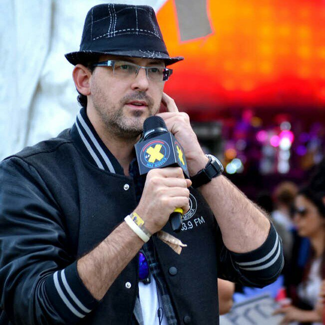 UribeDJ transmitiendo desde el festival Estéreo Picnic 2014